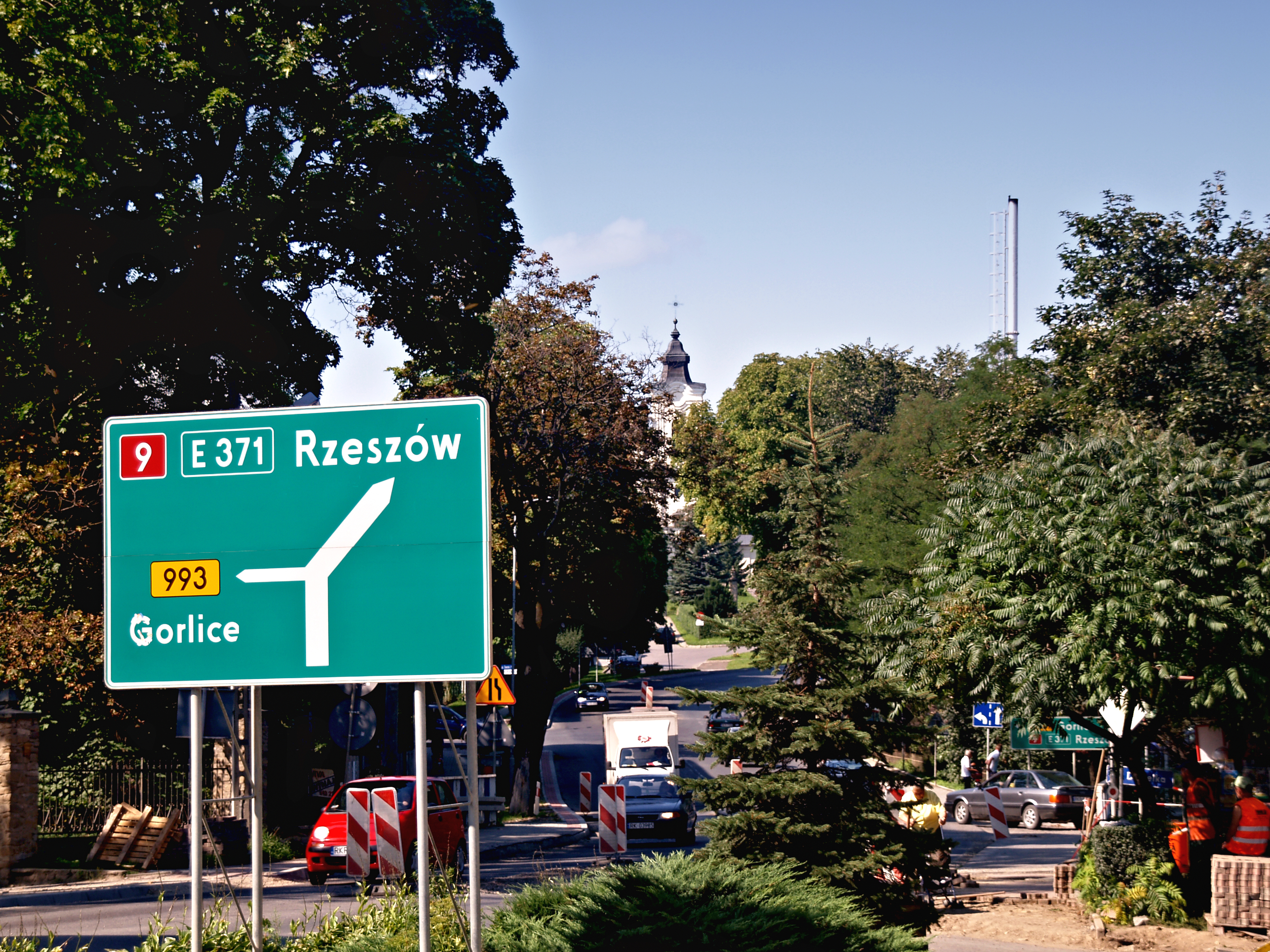 Dukla (Poland) - Route européenne 371